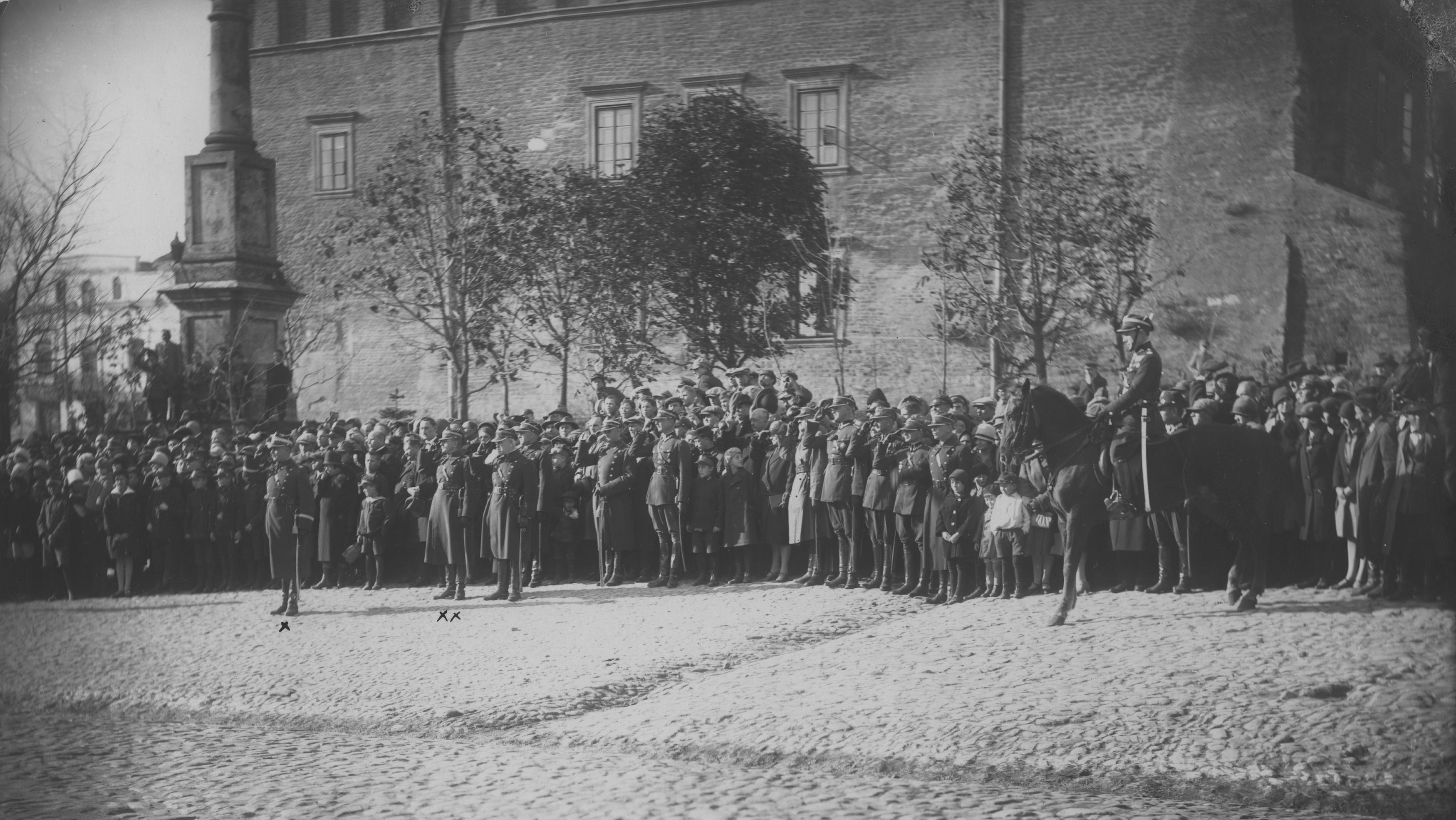 Defilada 4 Pułku Saperów na rynku w Sandomierzu. Gen. Tadeusz Kutrzeba (x) przyjmuje defiladę. Widoczny także m.in. dowódca Pułku ppłk Henryk Bagiński (xx). W tle widoczny średniowieczny ratusz. Koncern Ilustrowany Kurier Codzienny - Archiwum Ilustracji. Sygnatura: 1-W-1707